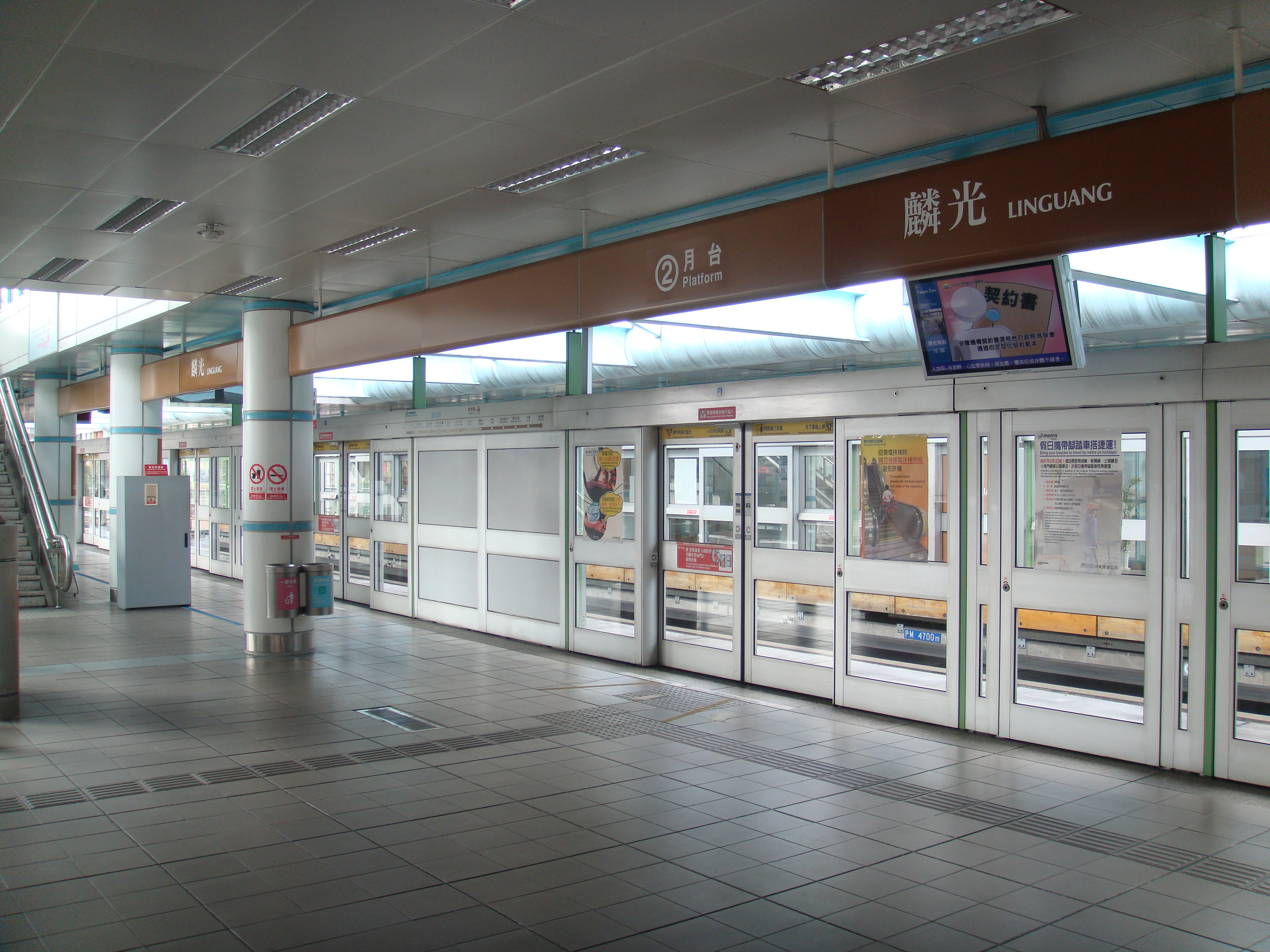 Linguang Station, Muzha Line, Taipei Metro, Taiwan.